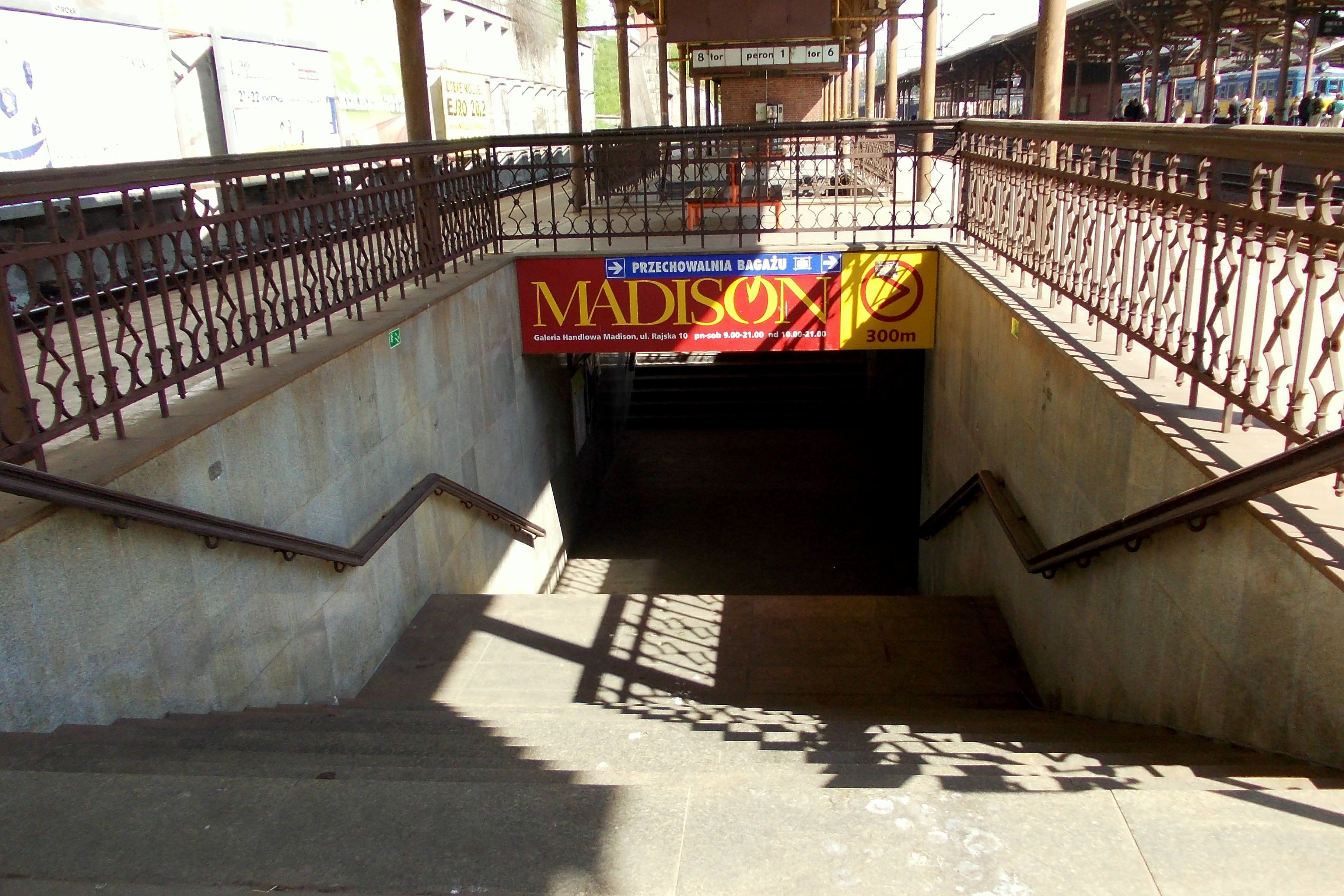 przejście pod torami w Gdańsku Głównym